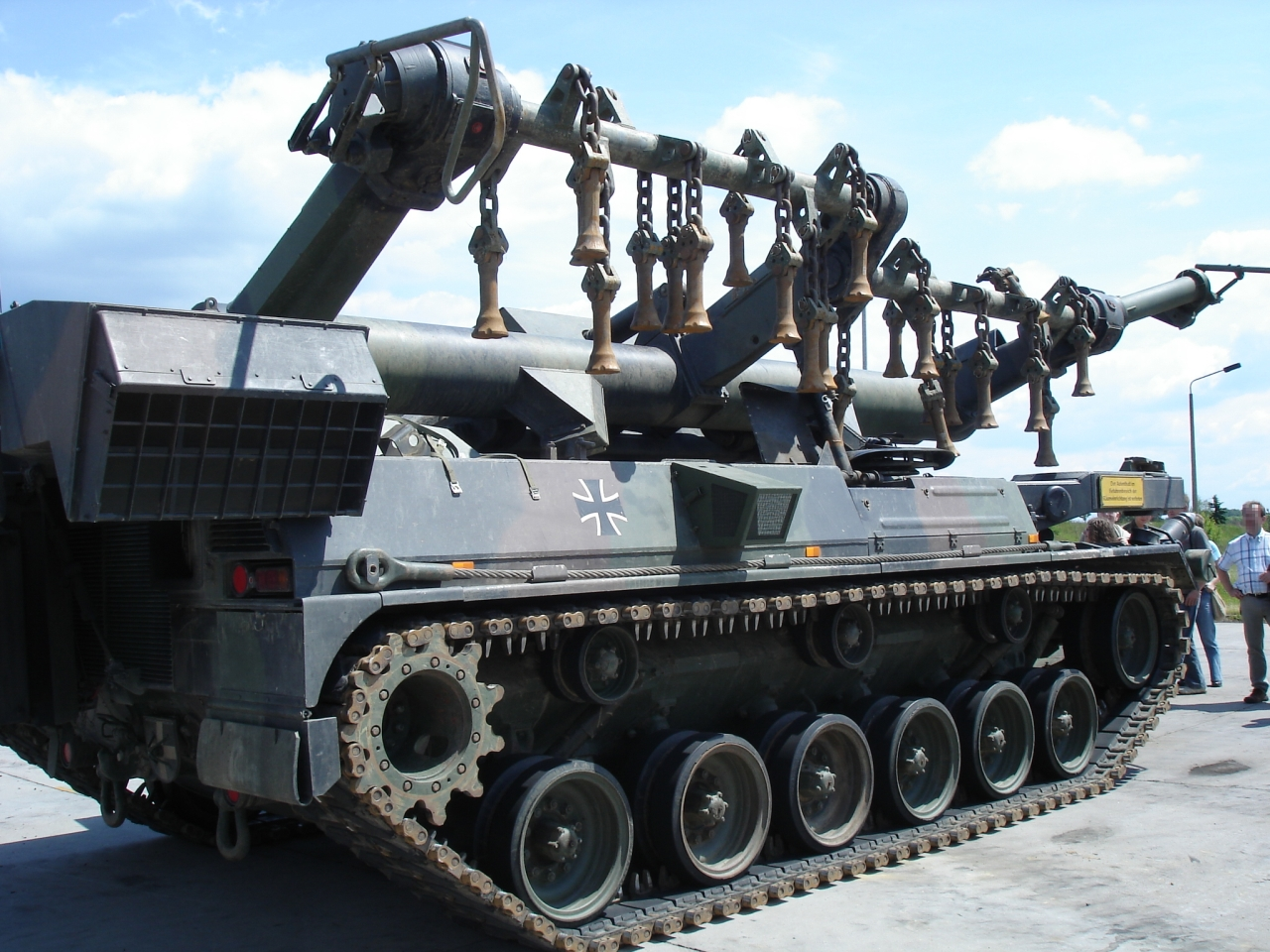 Minenräumpanzer KEILER in Marschstellung, Seitenansicht von rechts.